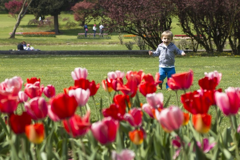 scuole al Parco